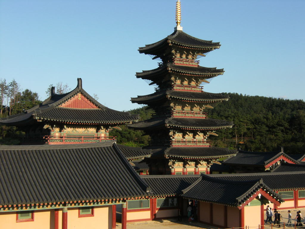 백제 능사 오층 목탑 충청남도 부여군 규암면 합정리